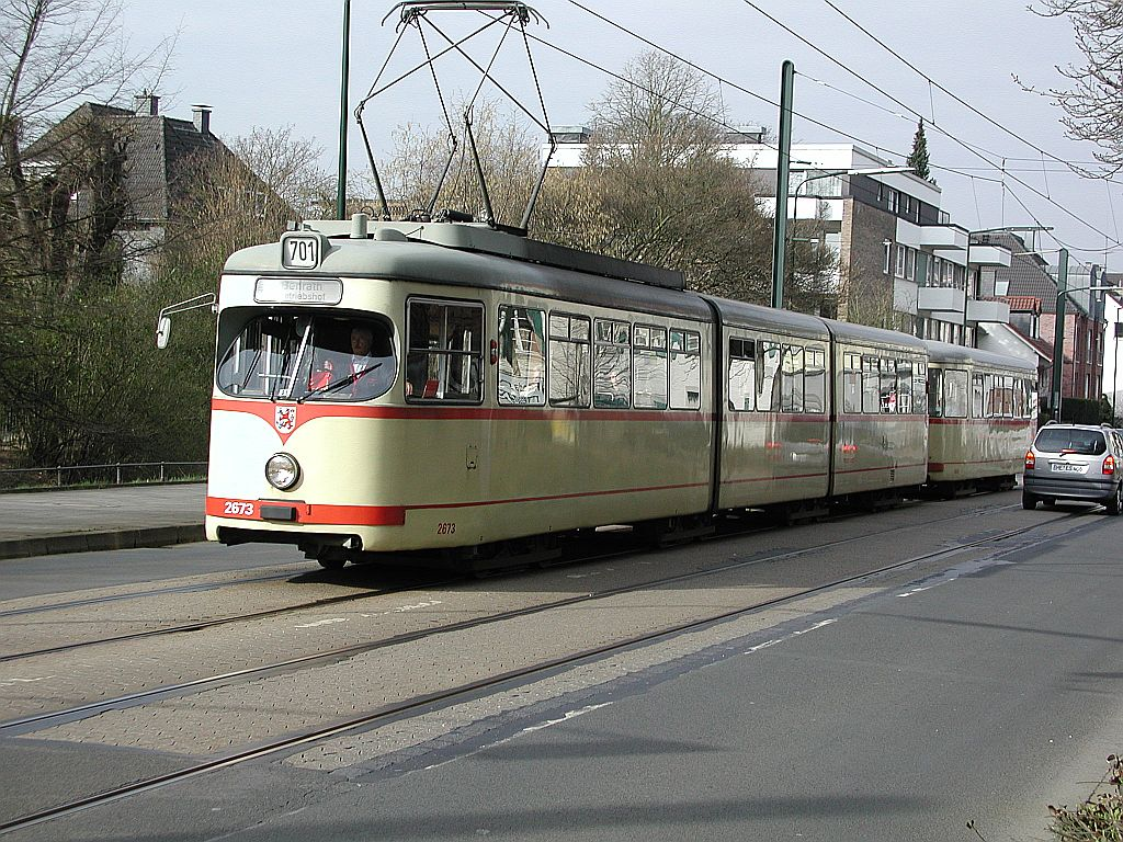 Rheinbahn Wagen 2673 kurz vor der Straßenbahnhaltestelle "Schloss Benrath" (Tram) Linie 701, Benrather Schloßallee, Düsseldorf-Benrath, Deutschland.